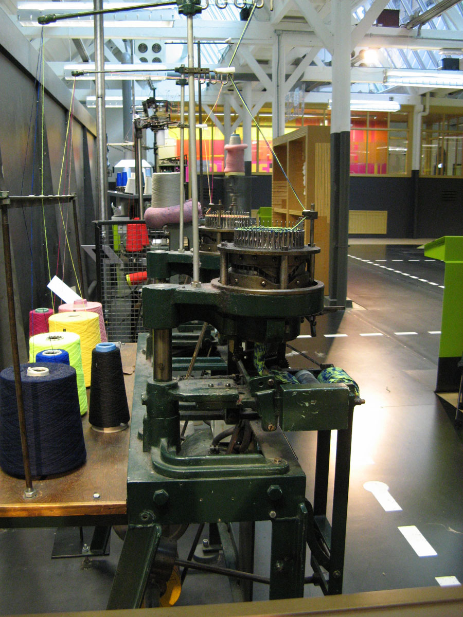 Rondbreimachine, Berridge and Co. (Leicester), ca 1959 (07031) Rondbreimachine2(ca 1959)